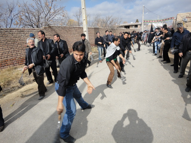 دسته عزاداری در روز عاشورا در روستای شنگل آباد